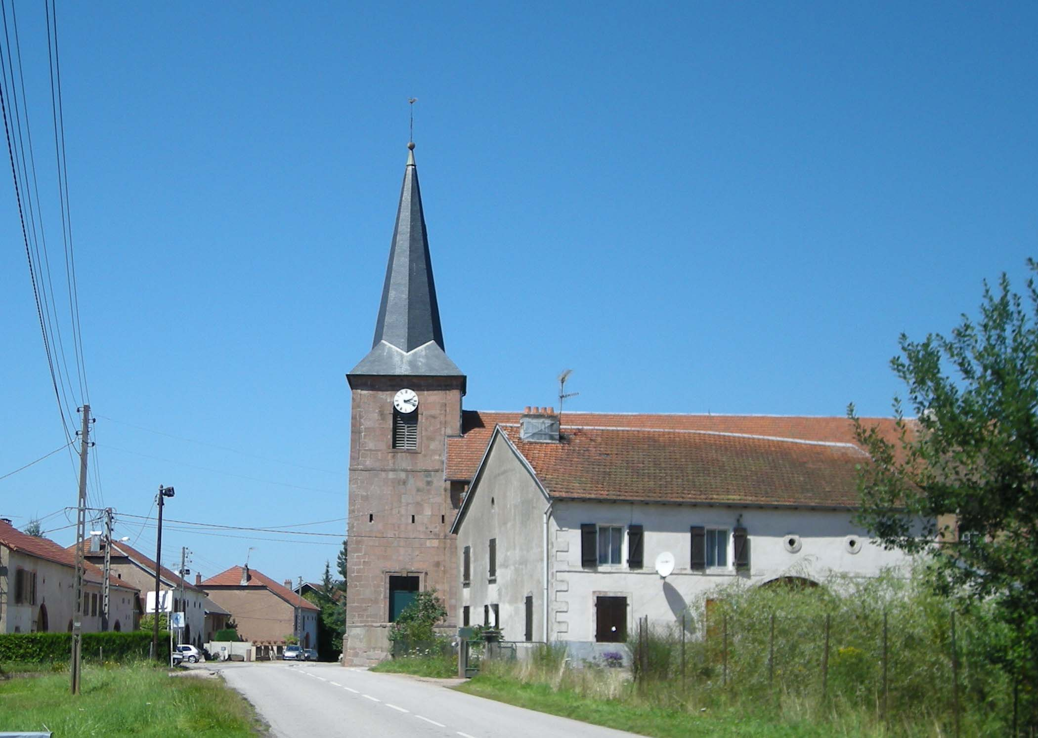 L'égise de La Voivre (Vosges, France)